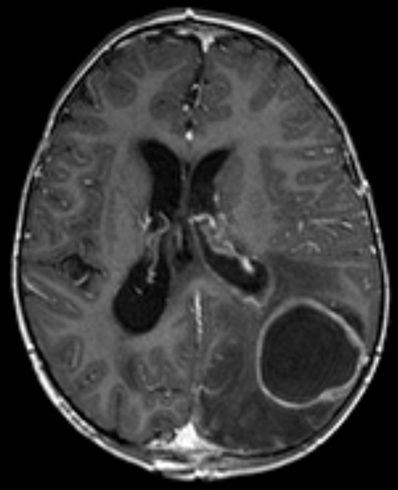 Hirnabszess in der MRT (axial T1w nach Kontrastmittel) mit klassischer ringförmiger Anreicherung und deutlichem perifokalem Ödem.